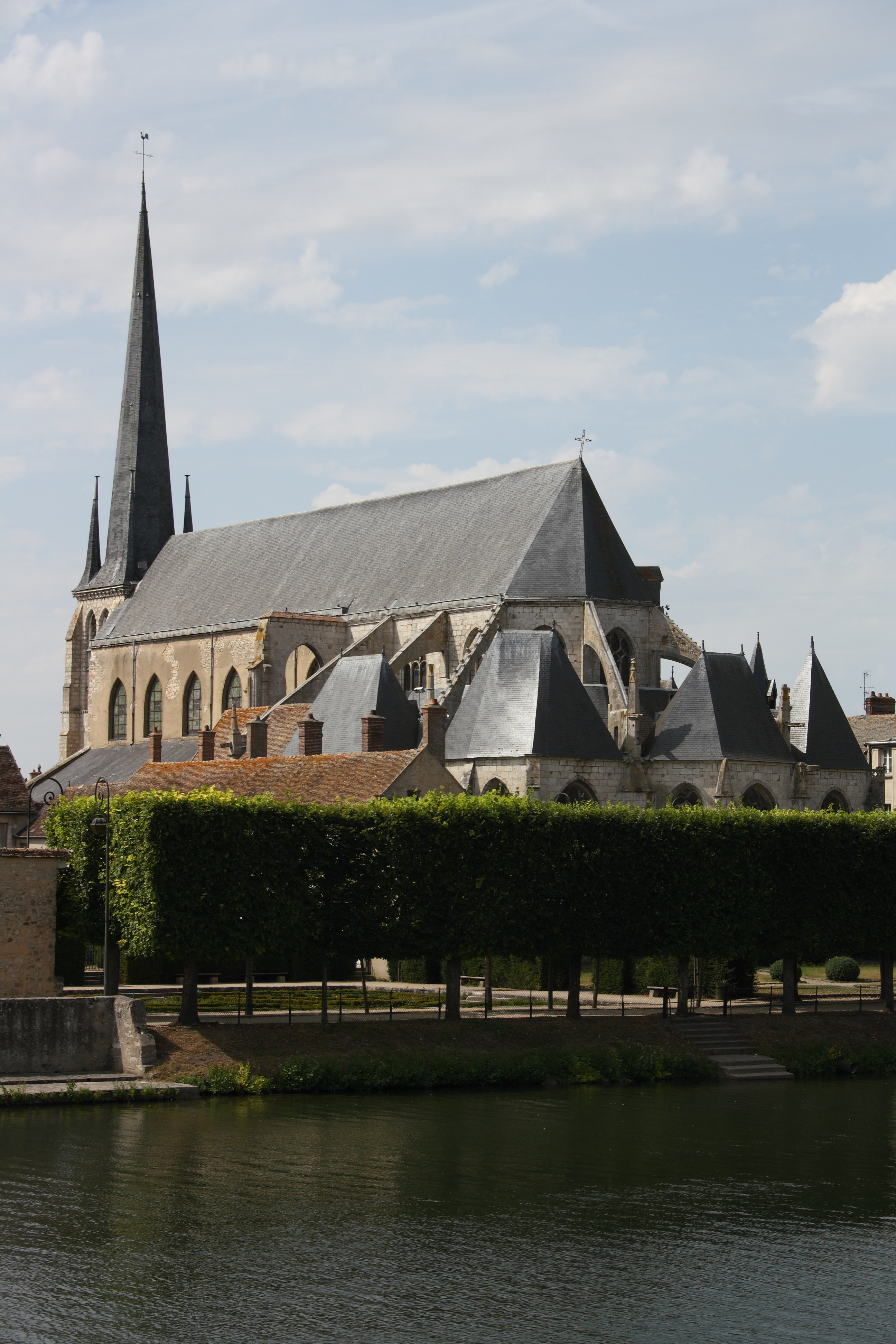 Katholische Pfarrkirche Saint-Jean-Baptiste in Nemours im Département Seine-et-Marne in der Region Île-de-France (Frankreich), Ansicht von Osten